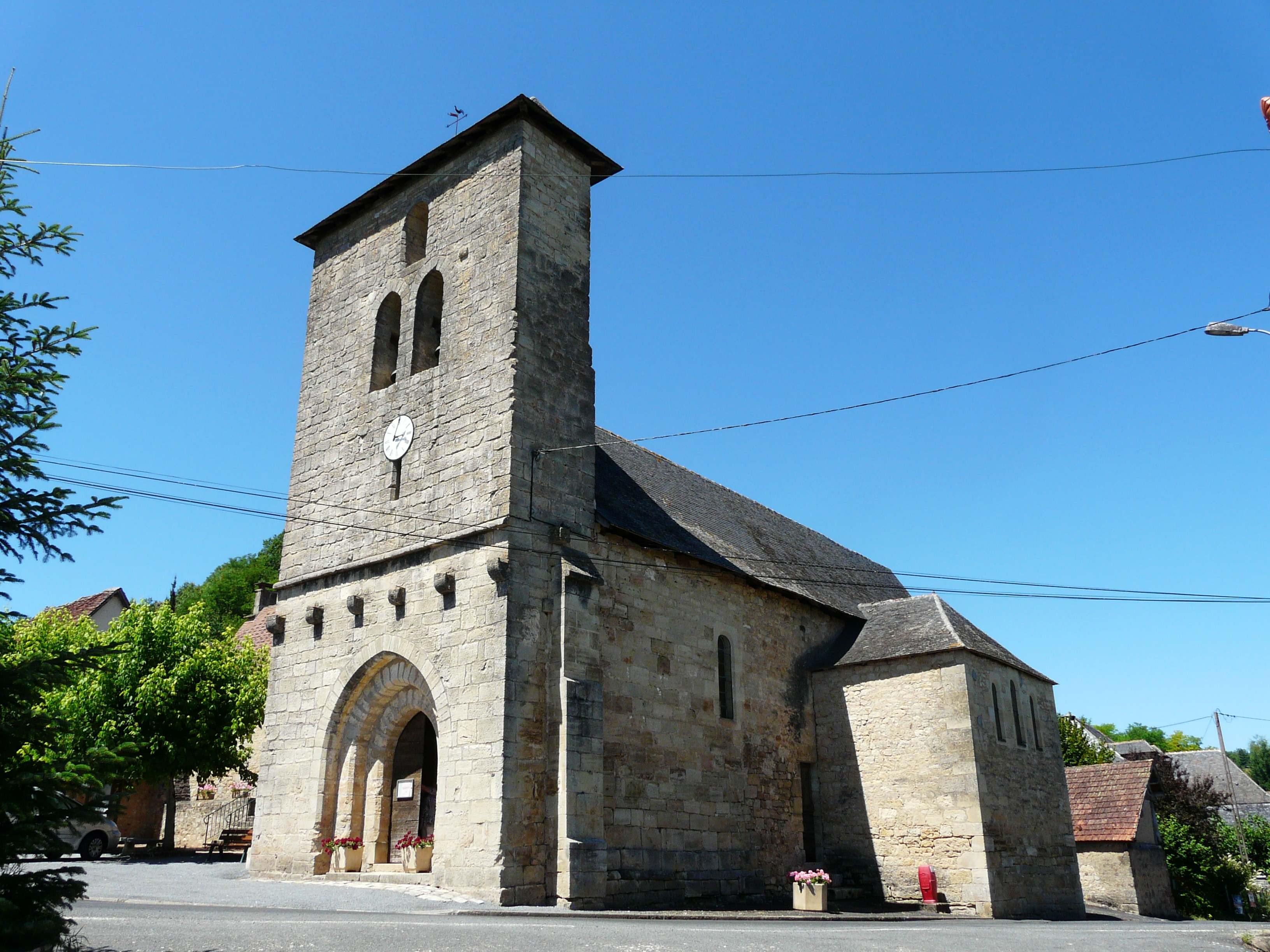 L'église Saint-Antoine, Coubjours, Dordogne, France.